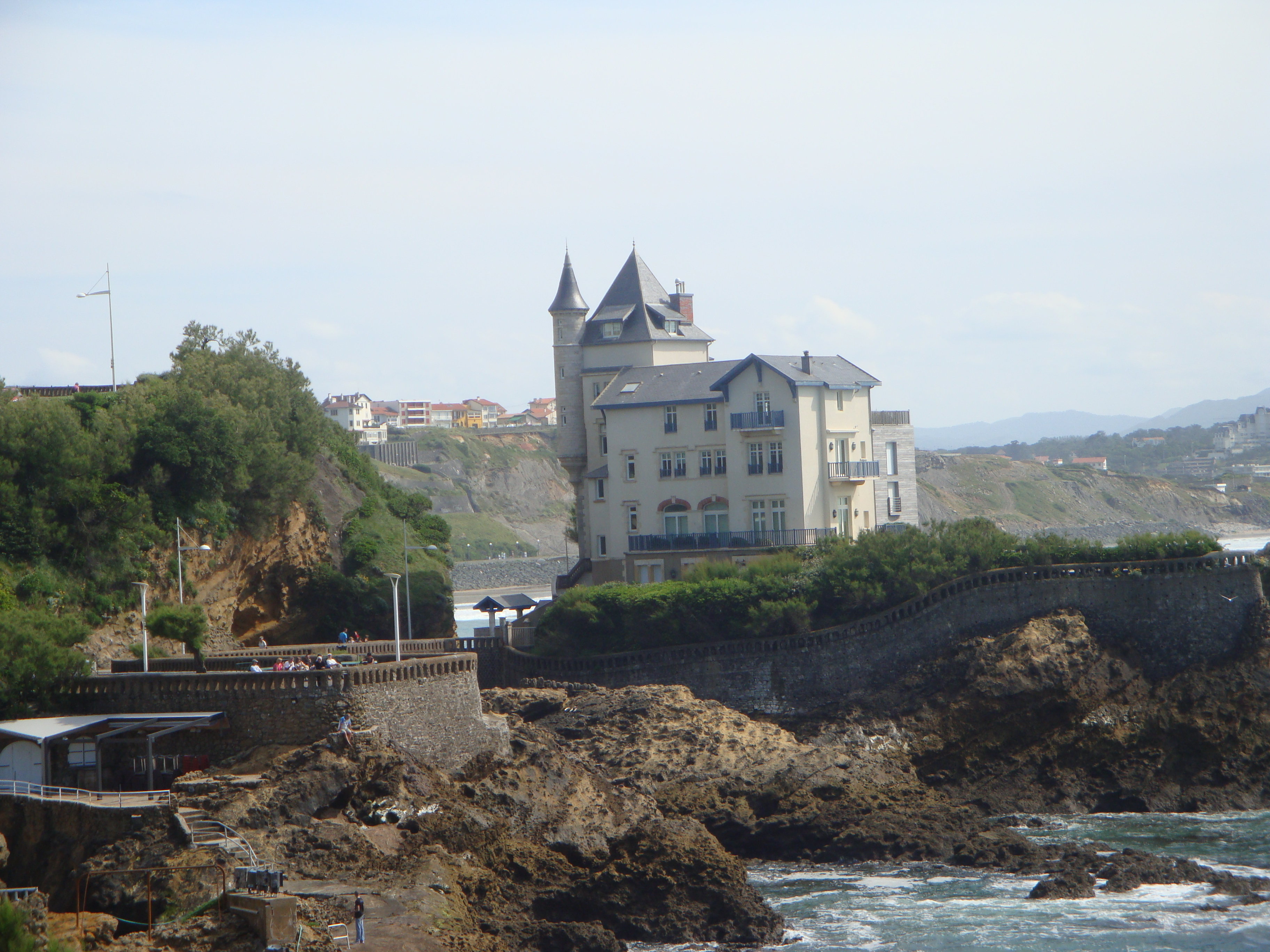 Edificio en Biarritz